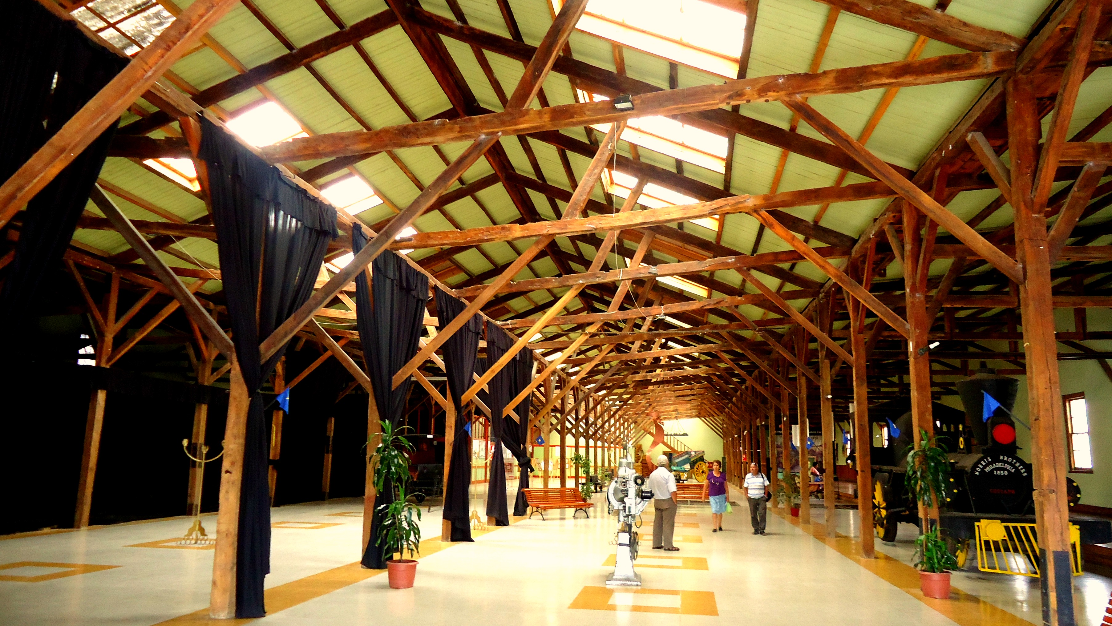 Estación de Ferrocarriles de Caldera This is a photo of a national monument in Chile: 561